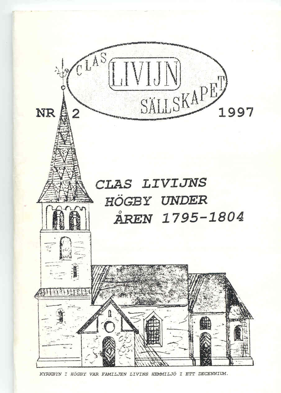 Clas Livijn sällskapets skrift.